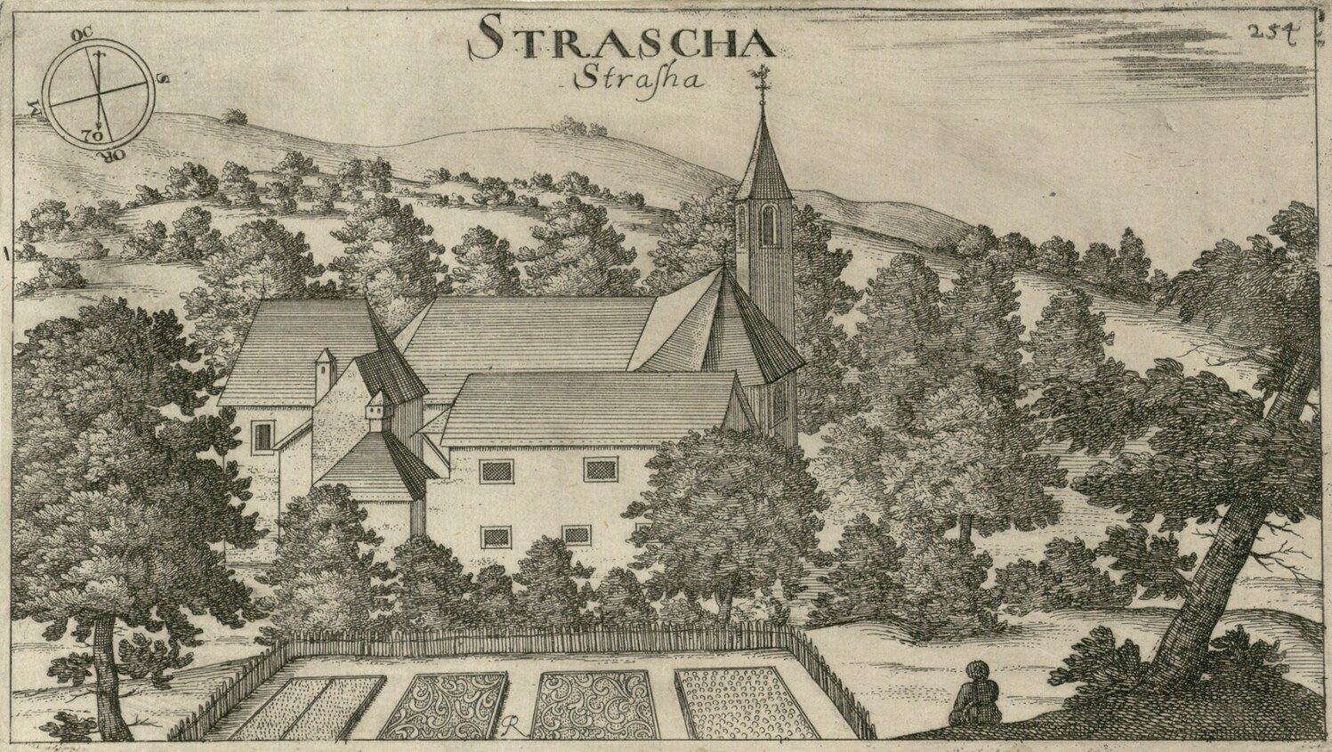 Dvorec Straža